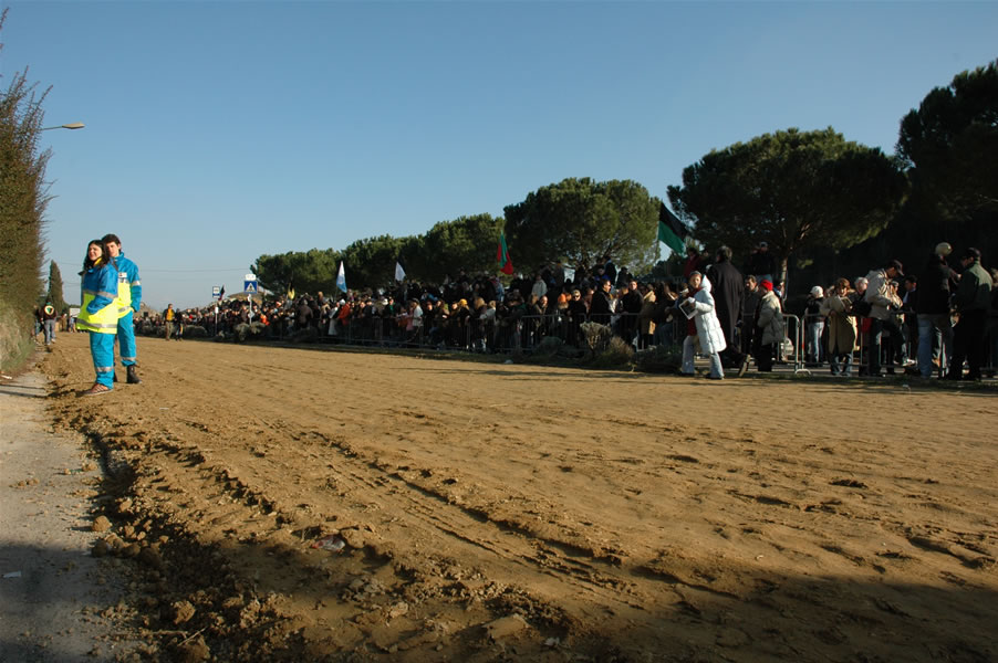 Palio di Buti - Una vista del percorso